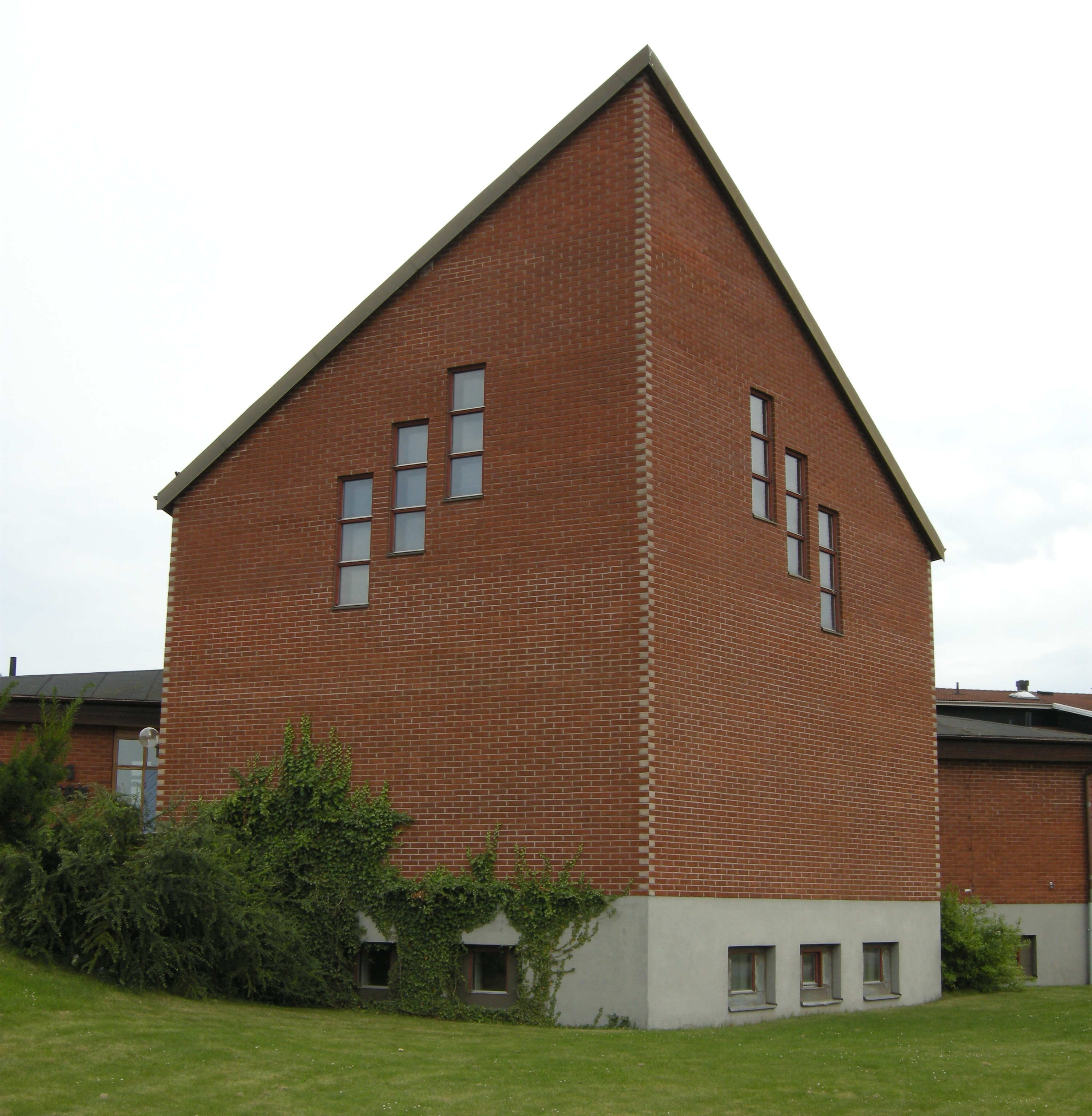 Åbylundskyrkans högdelen med hörnkedjor. Byggår 1983. Arkitekt Guy Sjöwall